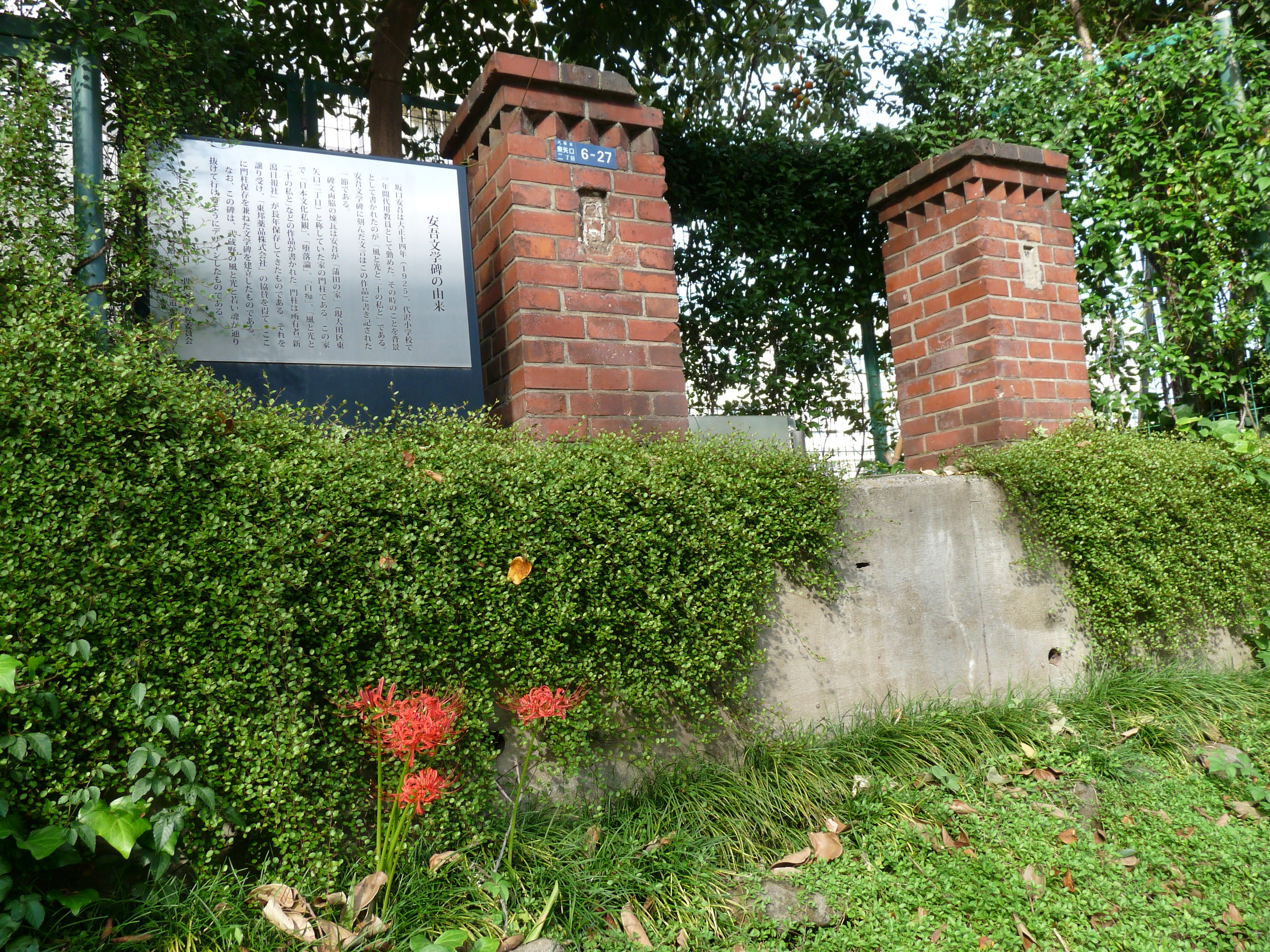 代沢小はかつて坂口安吾が代用教員として務めていた学校だ。このときの経験を書いたのが『風と光と二十の私』にだ。碑はこの一節を刻んでいる。